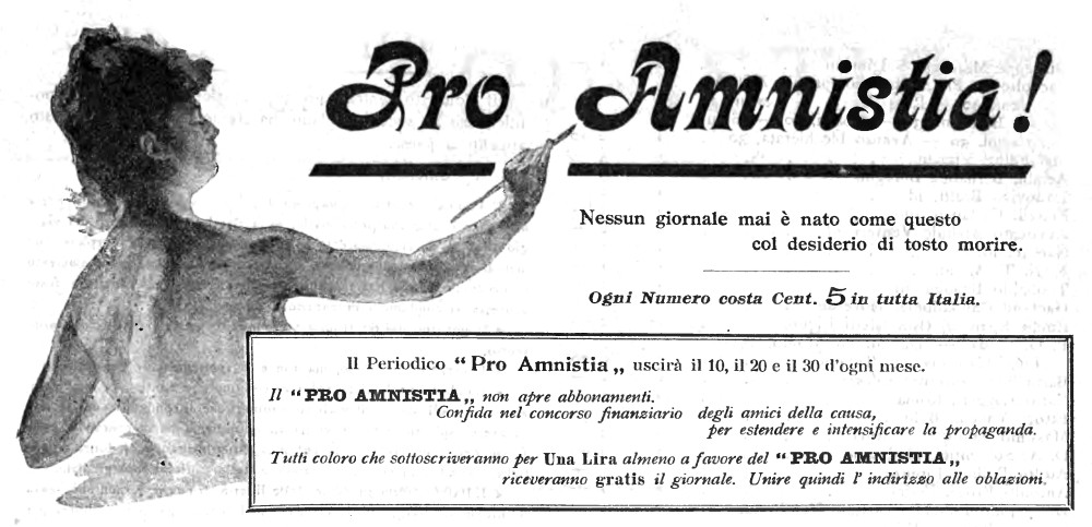 Testata della pubblicazione "Pro Amnistia" per i detenuti politici